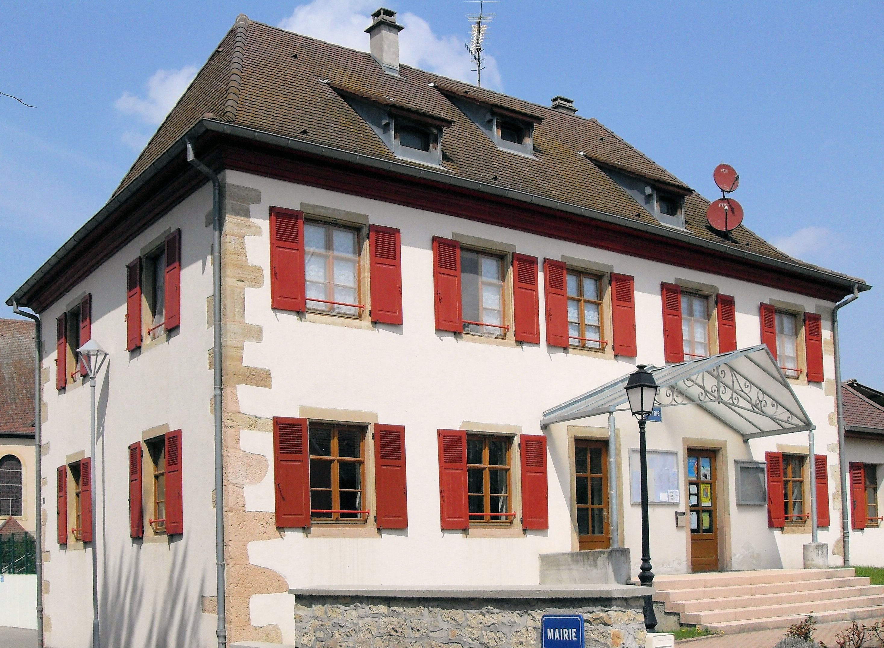 La mairie de Wahlbach